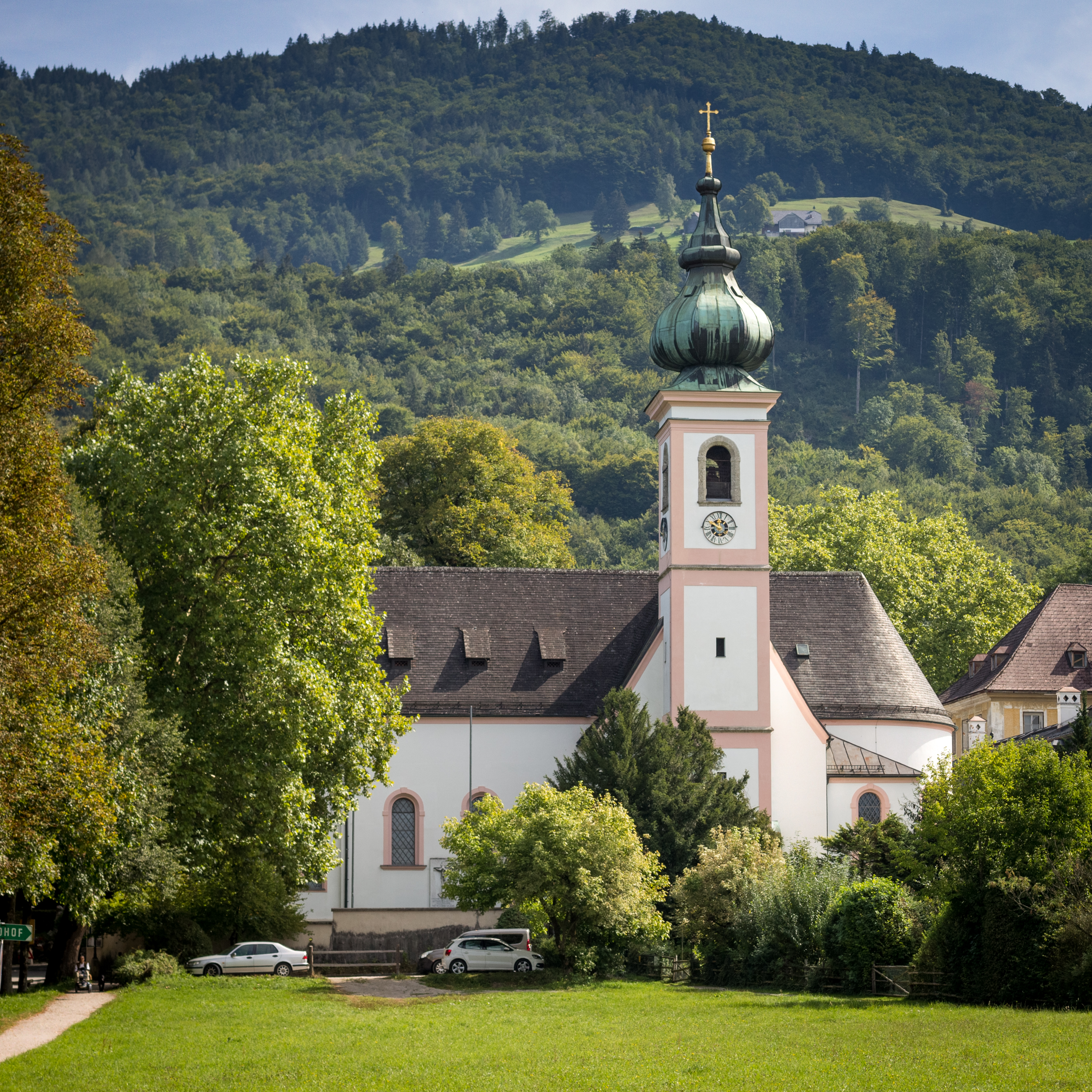 Kath. Pfarrkirche Aigen, hl. Johannes der Täufer mit ehem. Friedhof